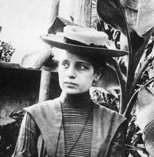 Lise Meitner around 1900